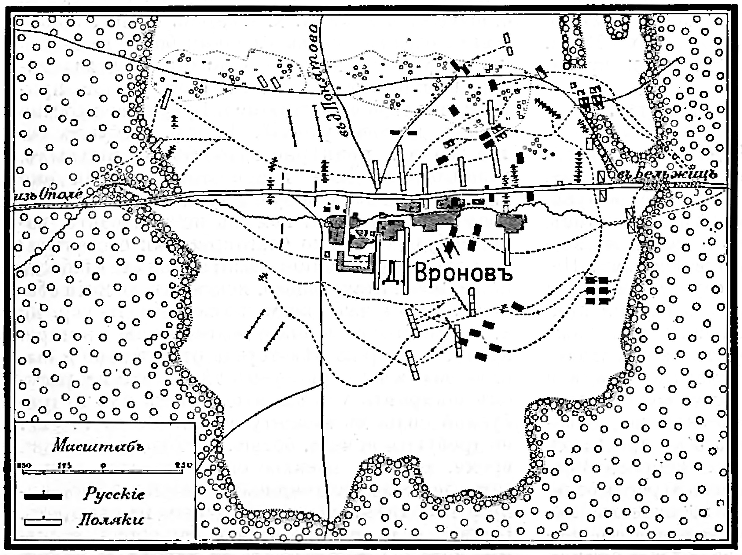 Данная картинка была использована в статье «Вронов» опубликованной в шестом томе «Военной энциклопедии», который был издан книгоиздательским товариществом Ивана Дмитриевича Сытина в 1912 году в столице Российской империи городе Санкт-Петербурге.